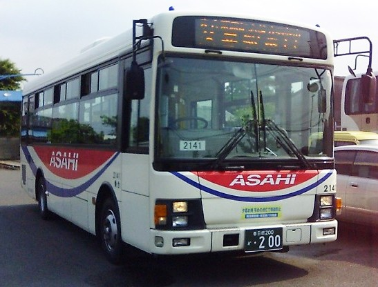 Asahi Bus.